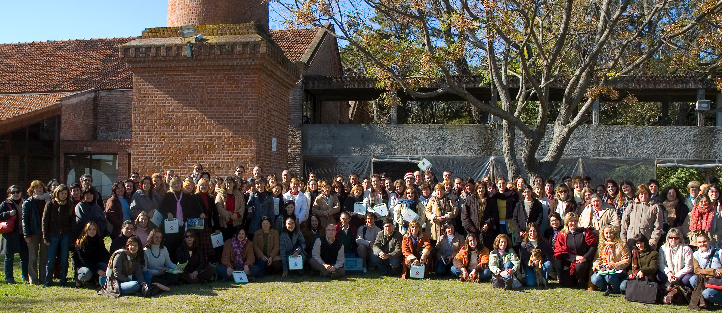 Foto de los participantes en las "II Jornadas sobre Educación y TICs. La XO una herramienta para apropiarse de la tecnología". Colonia del Sacramento. 5, 6 y 7 de junio de 2008.